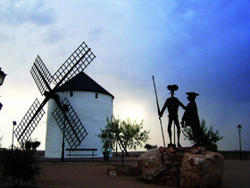 Vista lateral del Molino de Barrax.